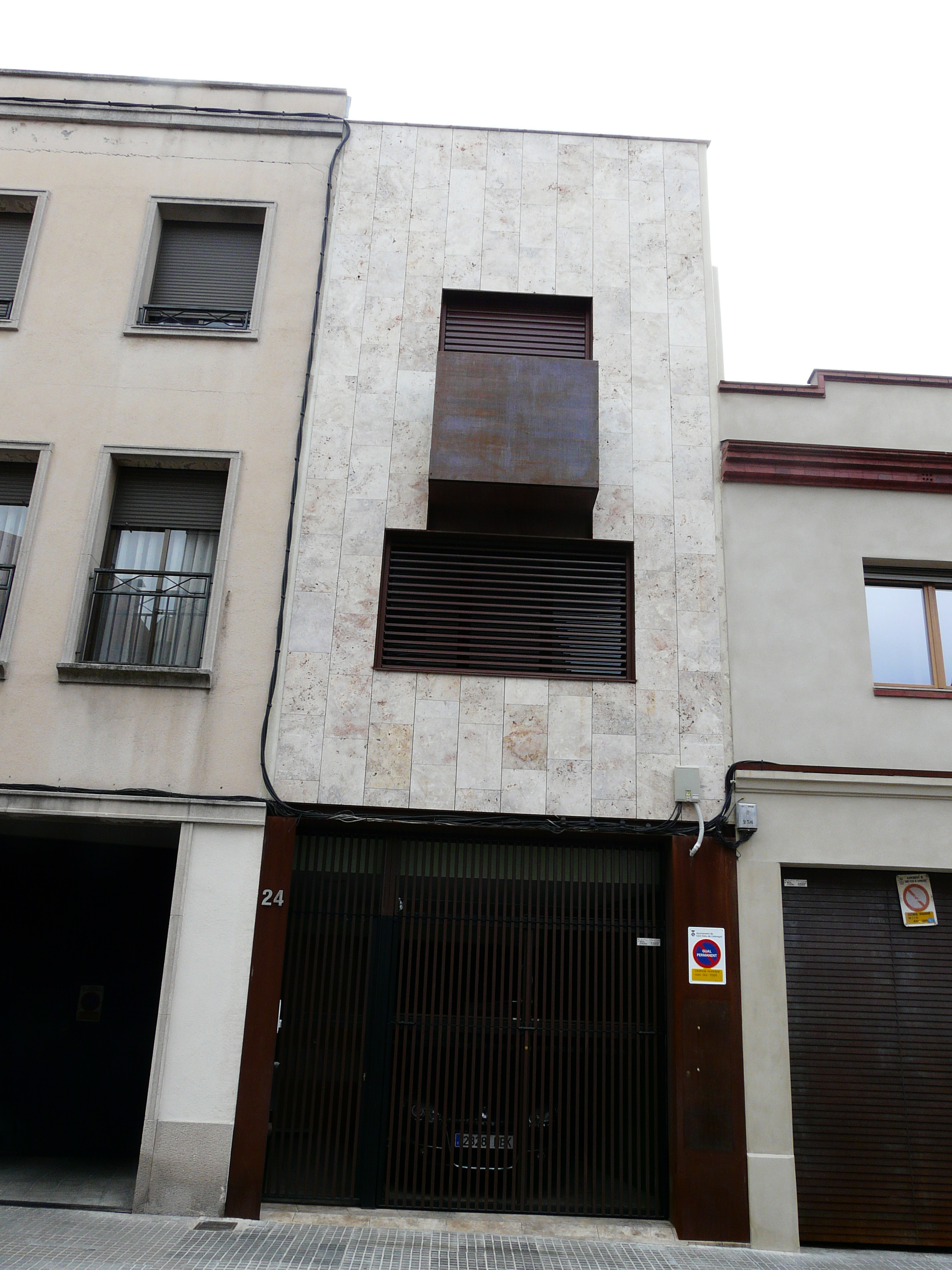 Habitatge al carrer Sant Llorenç, 24 (Sant Feliu de Llobregat) Object location41° 22′ 50.5″ N, 2° 02′ 56.8″ E